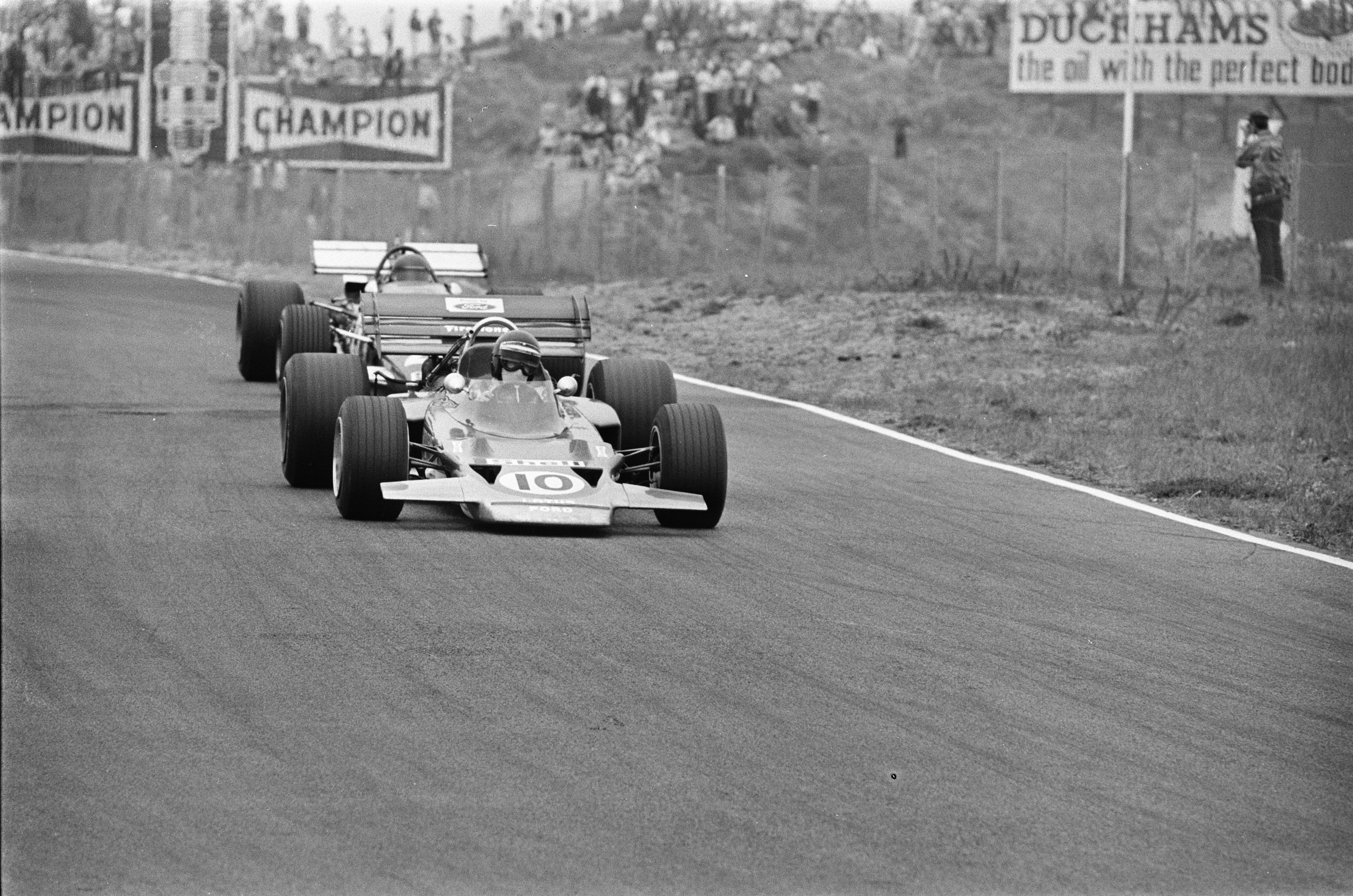 Grand Prix 1970 van Nederland voor Formule I wagens , Zandvoort; Jochem Rindt in Lotus 72 (nr. 10), achter Jackie Ickx in Ferrari